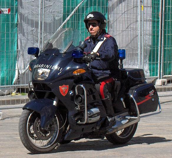 derivato (ritaglio) da File:Carabinieri in moto a Bologna (April 2006).jpg derivative work (crop) from File:Carabinieri in moto a Bologna (April 2006).jpg